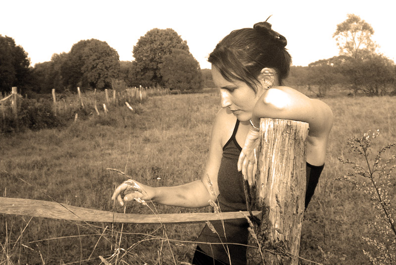 Dany2b